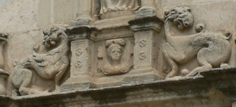 Budia-La portada, de estilo plateresco, se habría edificado a mediados del siglo XVI. Hay que destacar las cabezas de San Pedro y San Pablo, de tamaño natural, colocadas en los lados de la puerta y encima están las caras de los 12 apóstoles.